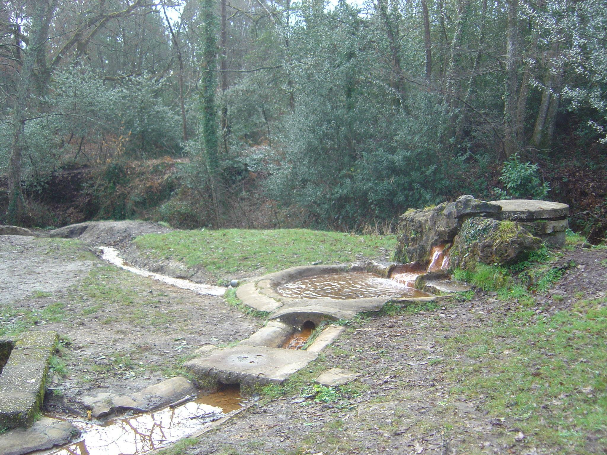 Les sources